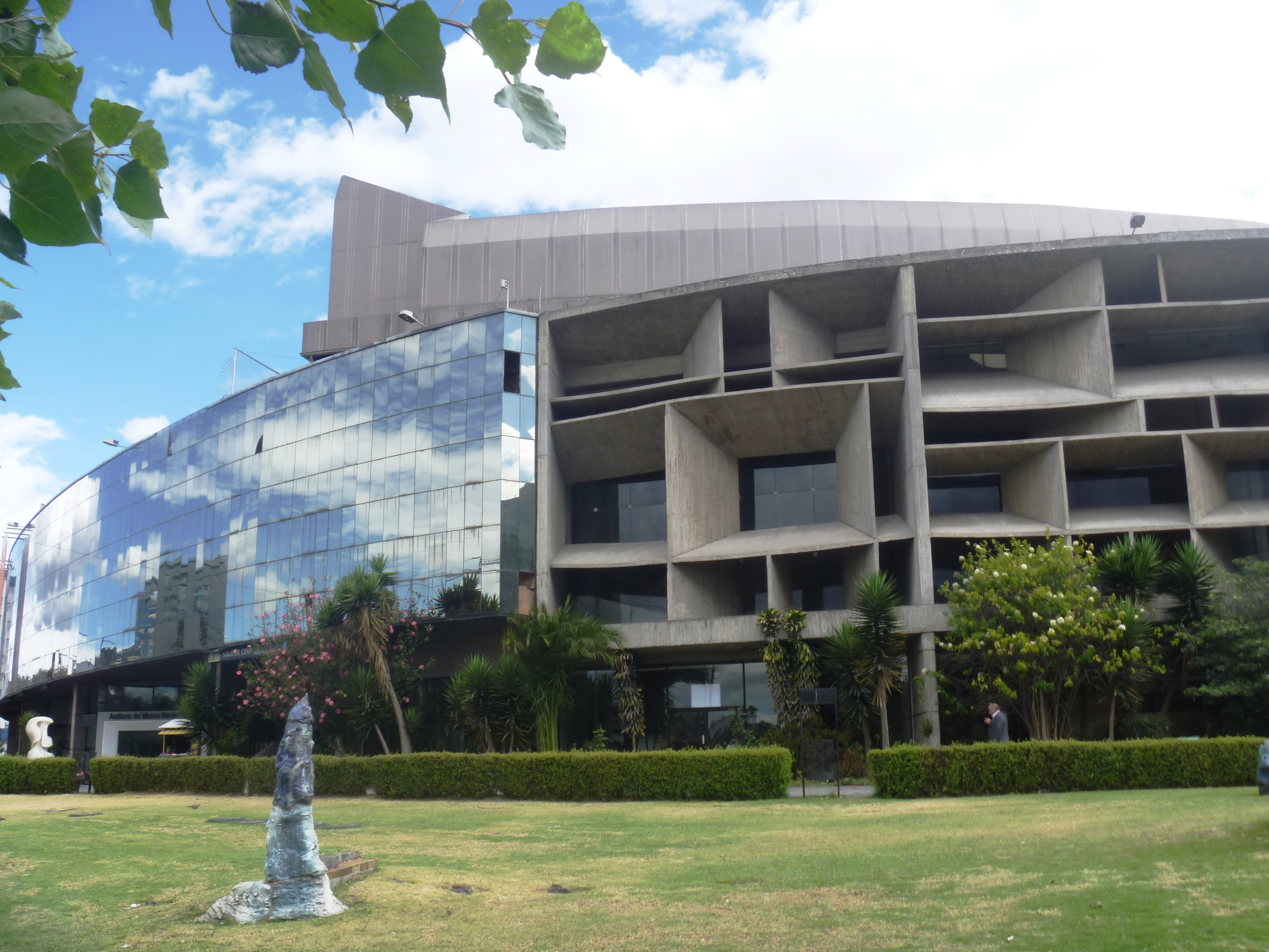 Edificio de los Espejos, parte del complejo Casa de la Cultura Ecuatoriana de la ciudad de Quito.